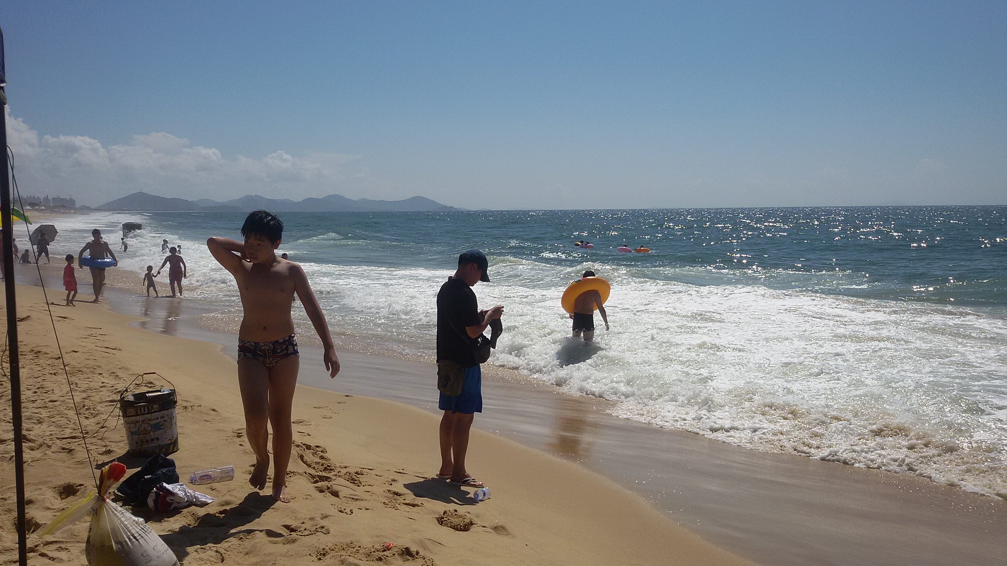 粵語: 阳江嘅东方银滩